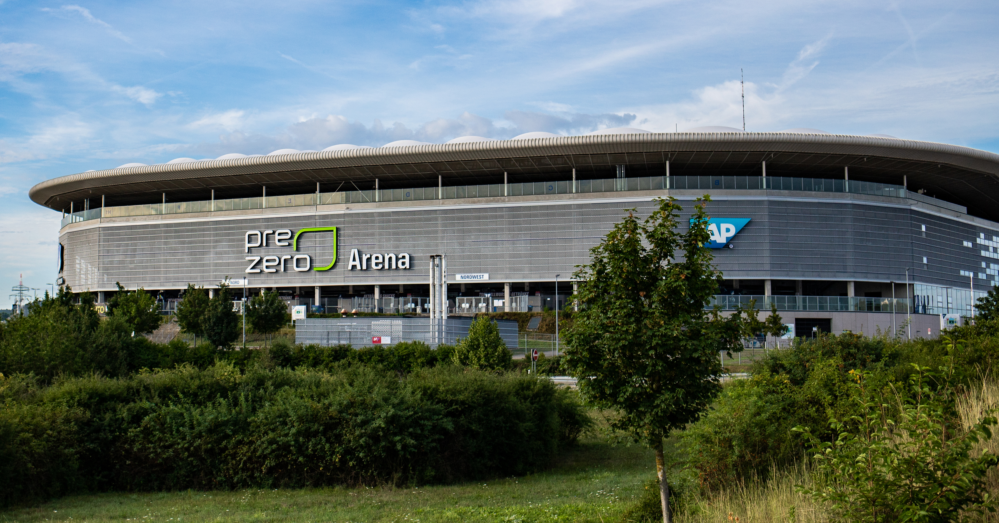 Fußball, TSG Hoffenheim, PreZero Arena in Hoffenheim